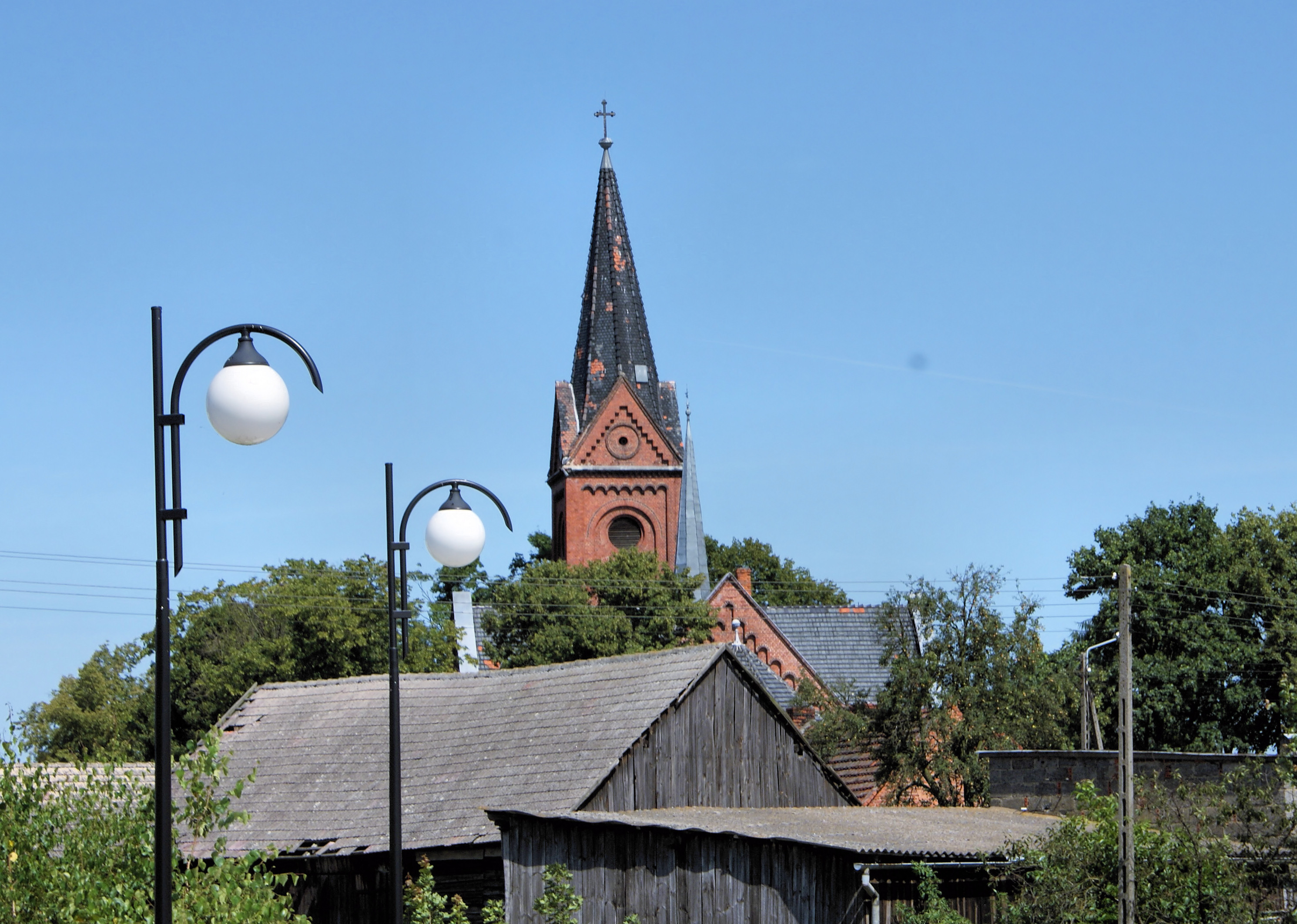 Solec – wieś w Polsce położona w województwie wielkopolskim, w powiecie średzkim, w gminie Krzykosy.